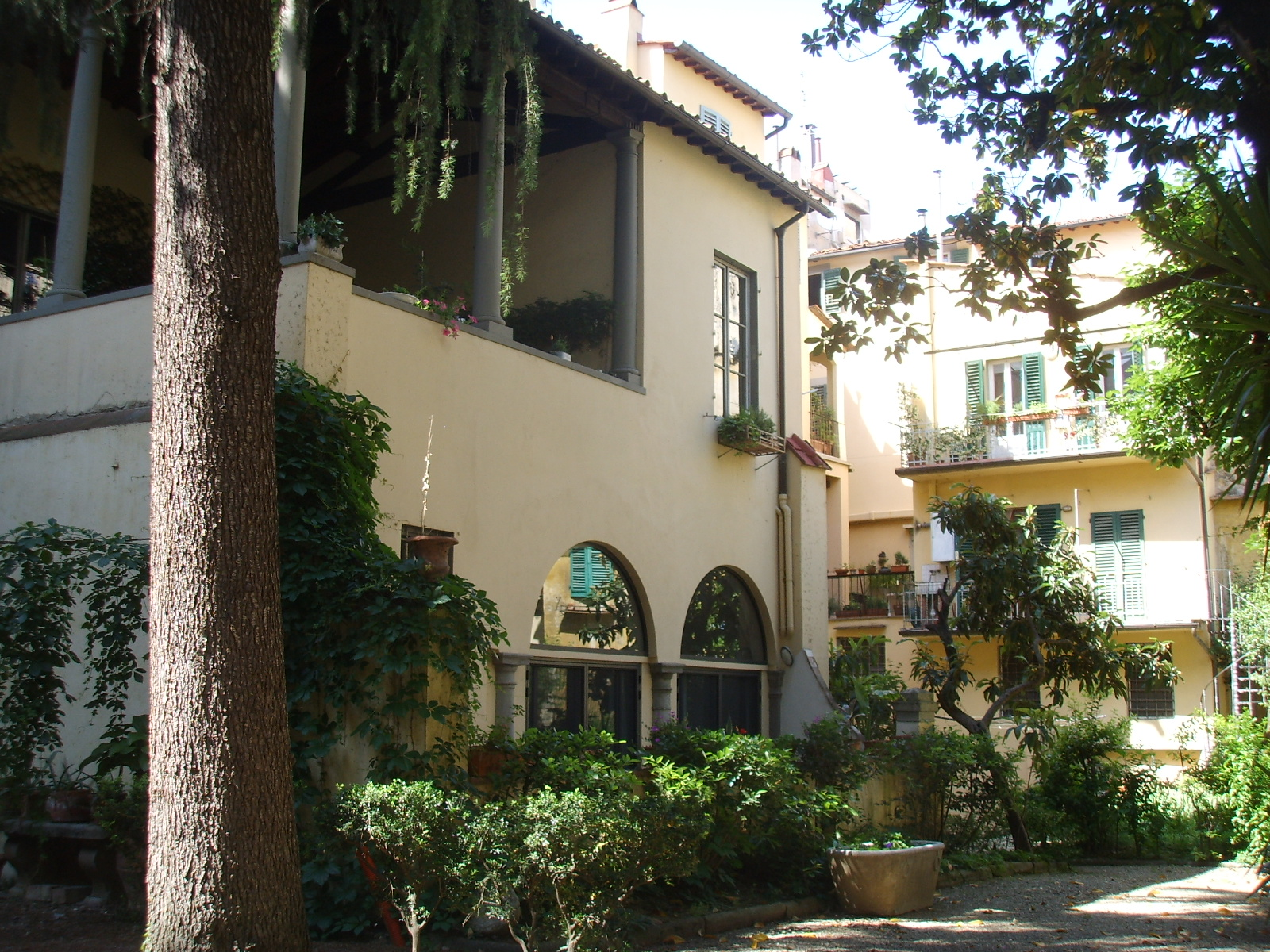 see description